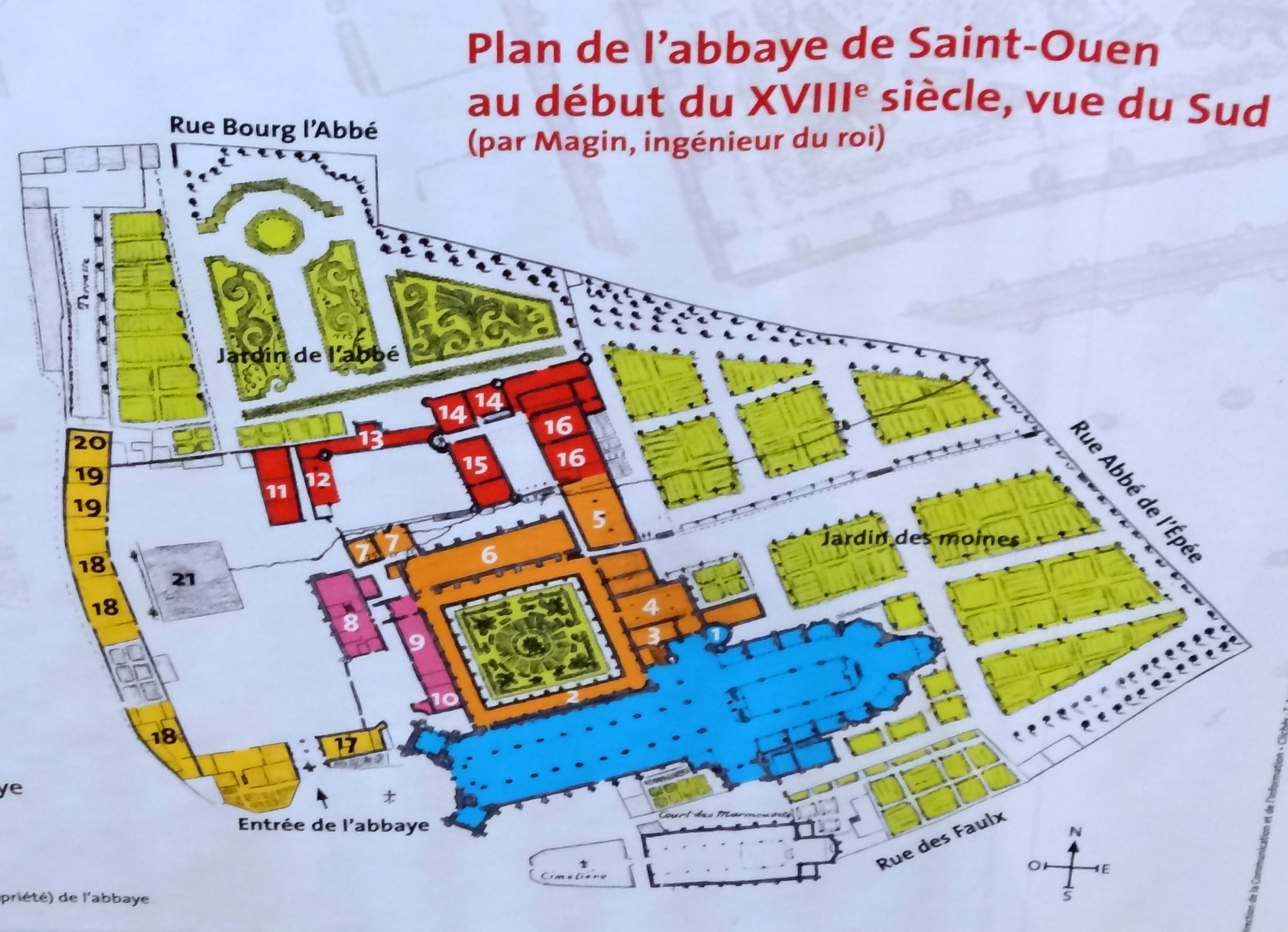 Plan de l'Abbaye Saint-Ouen de Rouen (XVIII s) (Haute-Normandie)